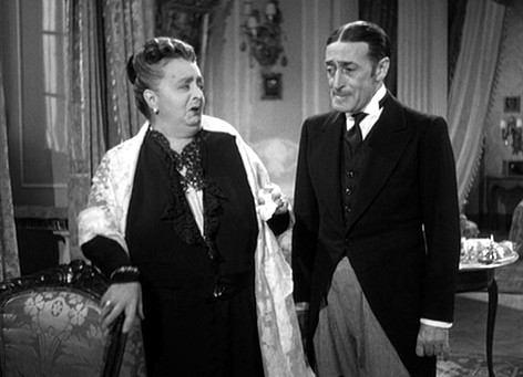 Screenschot Ada Dondini e Totò film Totò sceicco (1950), di Mario Mattoli